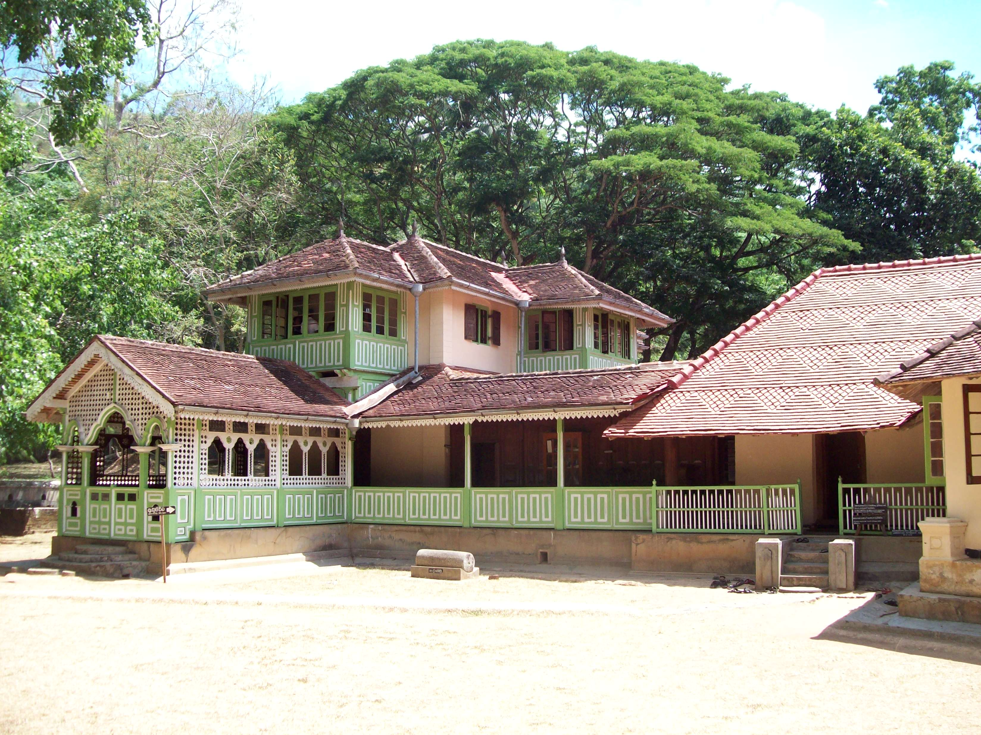 Royal Palace Maduwanwela Walawwa - මඩුවන්වෙල වලව්ව 2012